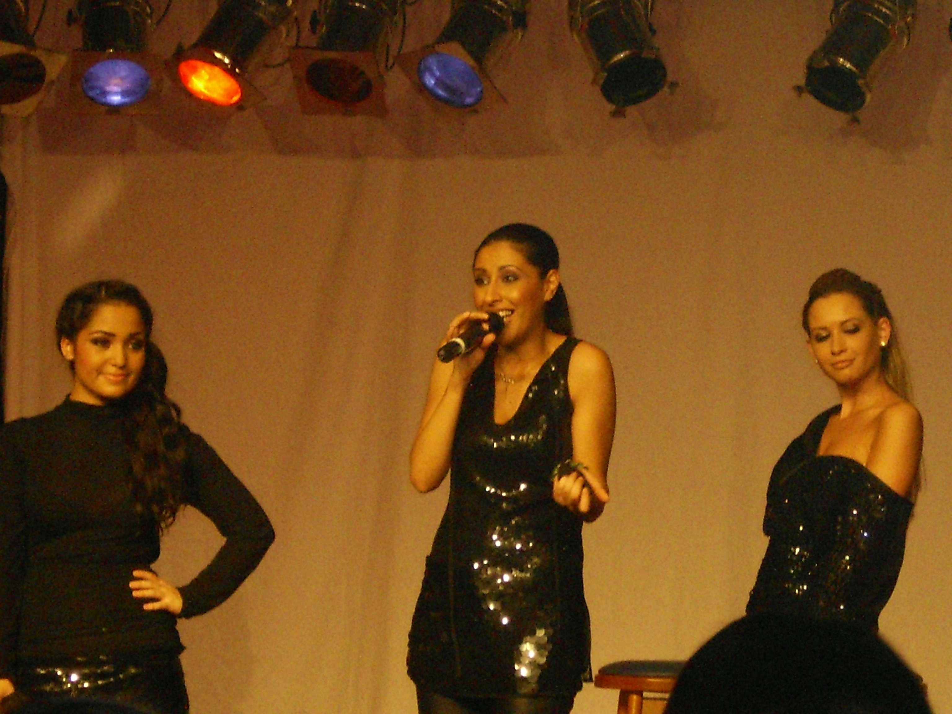 Monrose beim dritten Fanclub-Treffen vom 8. November 2008 in Gross-Gerau.